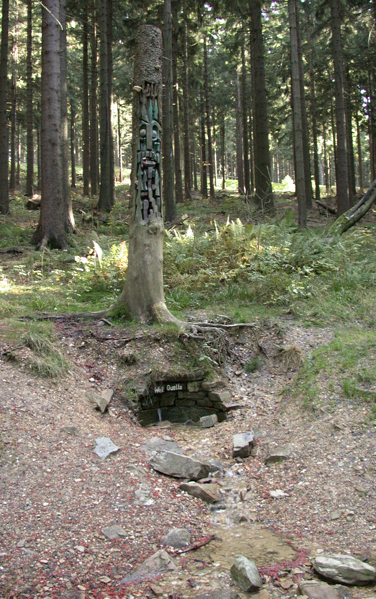 Quelle des Flusses Weil am Kleinen Feldberg, Deutschland